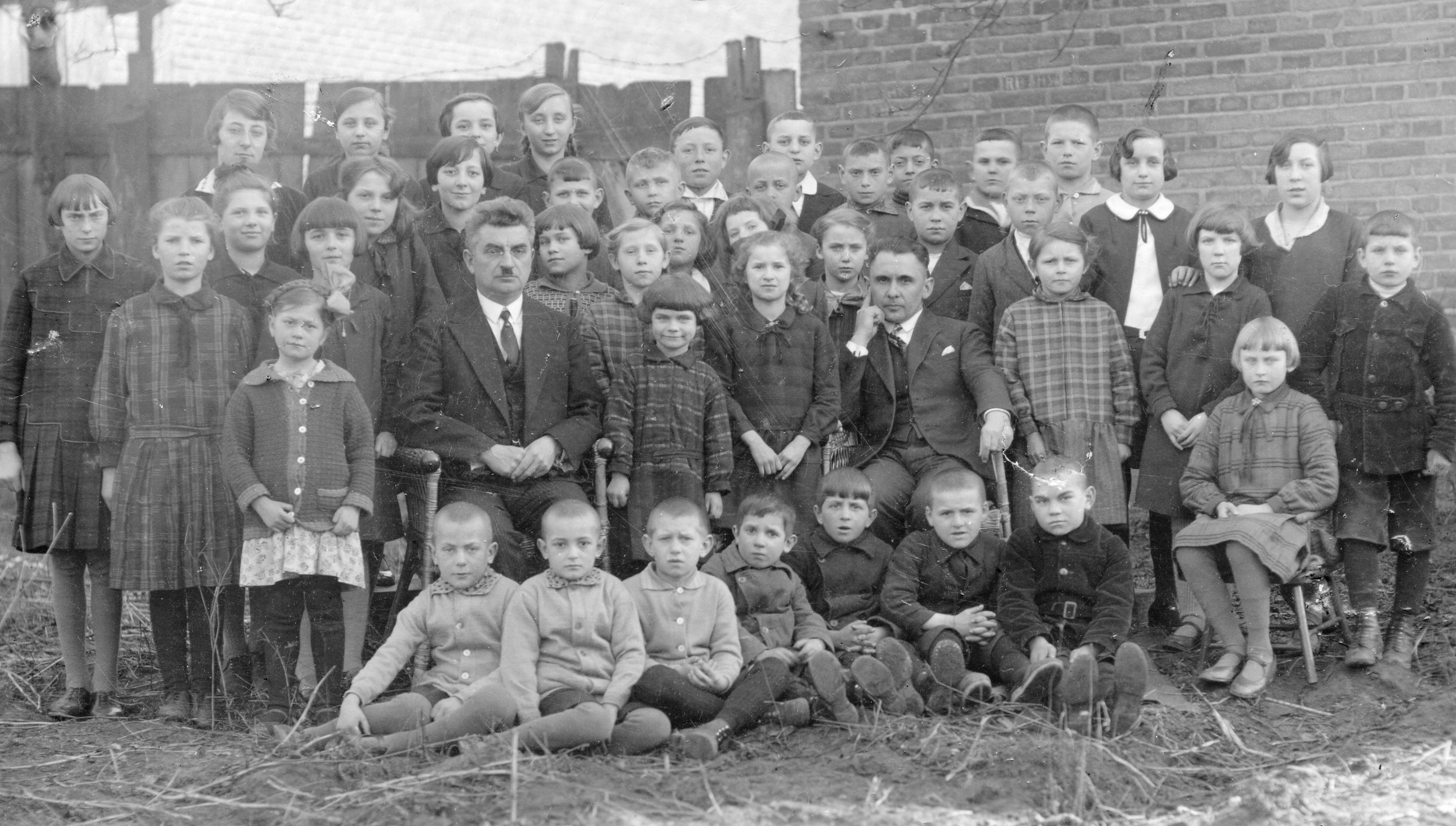 Juliusz Zieliński (z wąsikiem; 1881-1944), działacz Związku Polaków w Niemczech, dyrektor szkoły polskiej w Złotowie, w otoczeniu uczniów